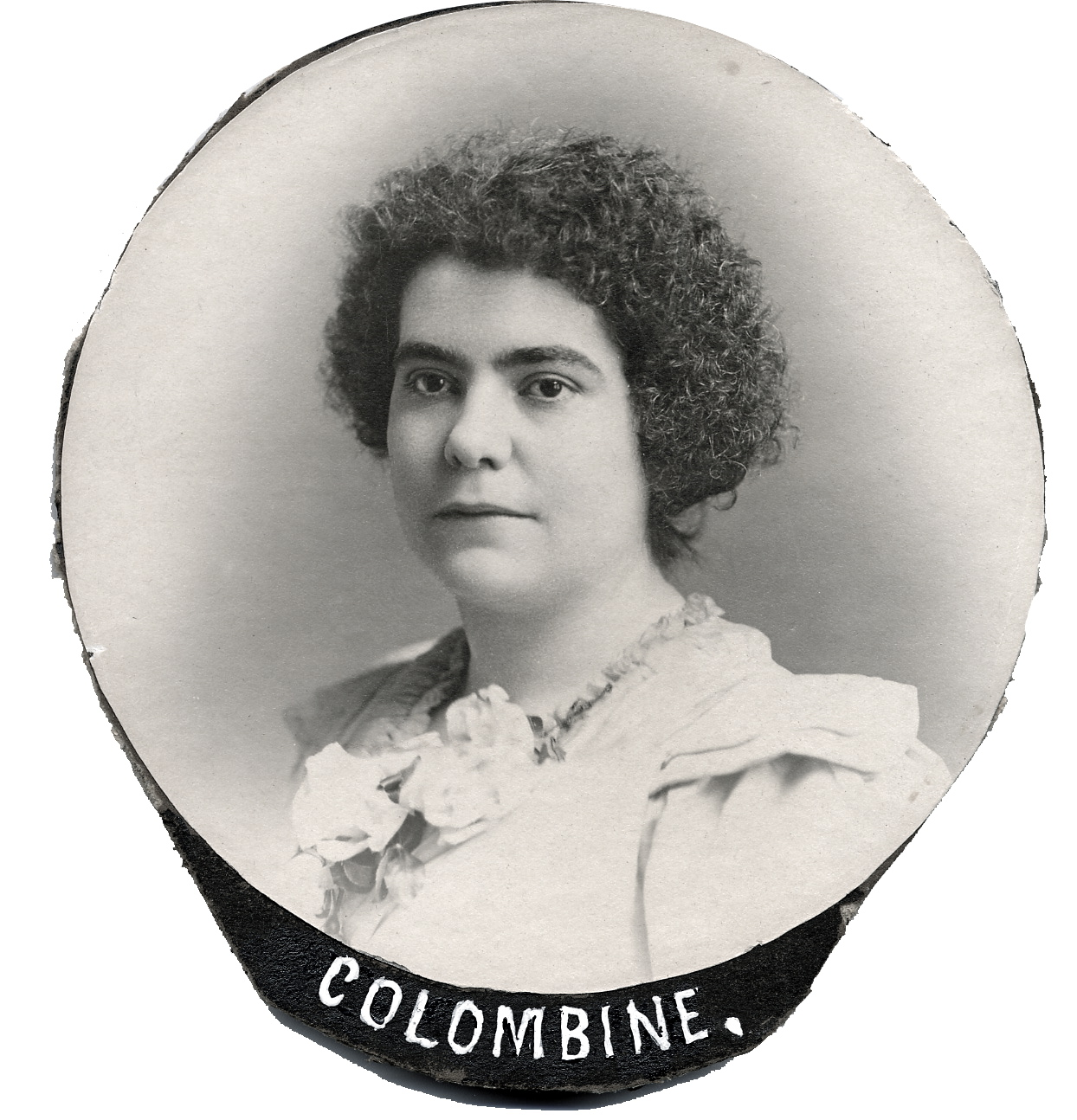 Eva Circé (Colombine). Cet exemplaire de la photographie a été découpé d'une mosaïque qui groupait des photographies des collaborateurs du journal Le Pionnier en 1901 et dont une reproduction a été publiée dans Le Monde illustré (Montréal) du 23 novembre 1901 (vol. 18, no 917), pages 480 et 481.